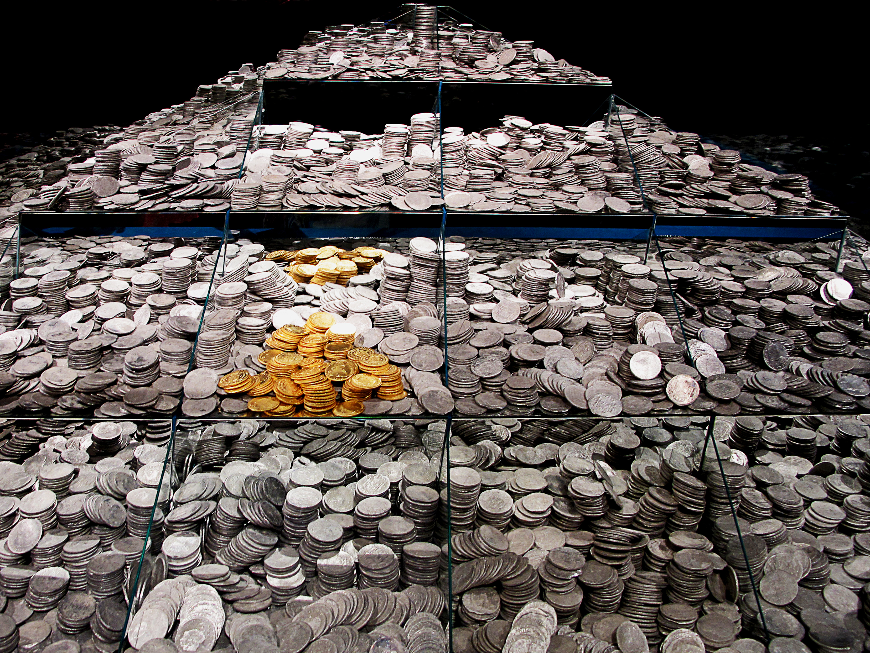 =================================== Un tesoro cultural recuperado Se estima que había unas 600.000 monedas pertenecientes al reinado de Carlos IV. Los documentos indican que la fragata transportaba aproximadamente 360 monedas de oro de las que se han recuperado 212. Museo Arqueológico Nacional (Madrid)